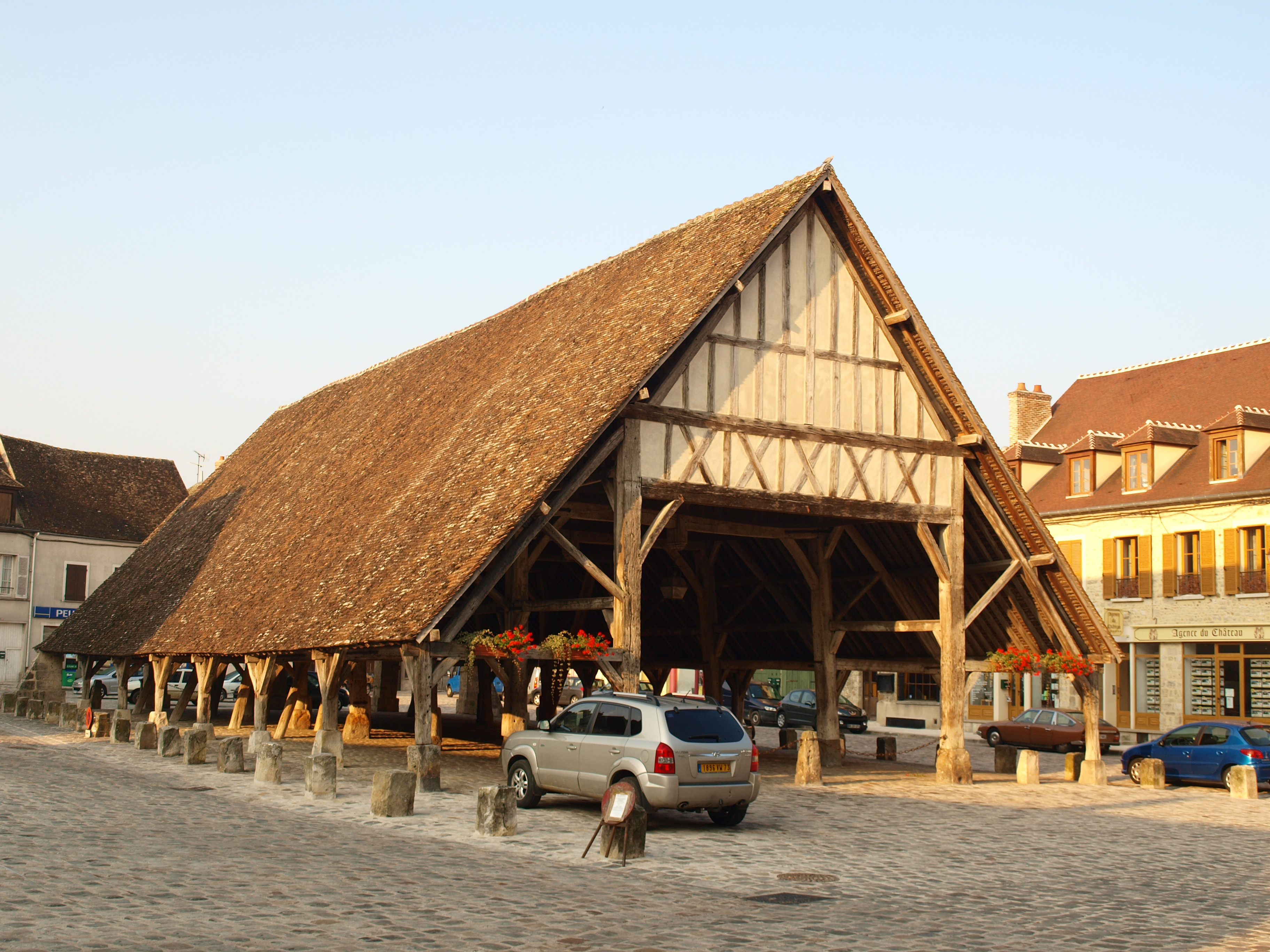 Égreville (Seine-et-Marne, France) ; halle